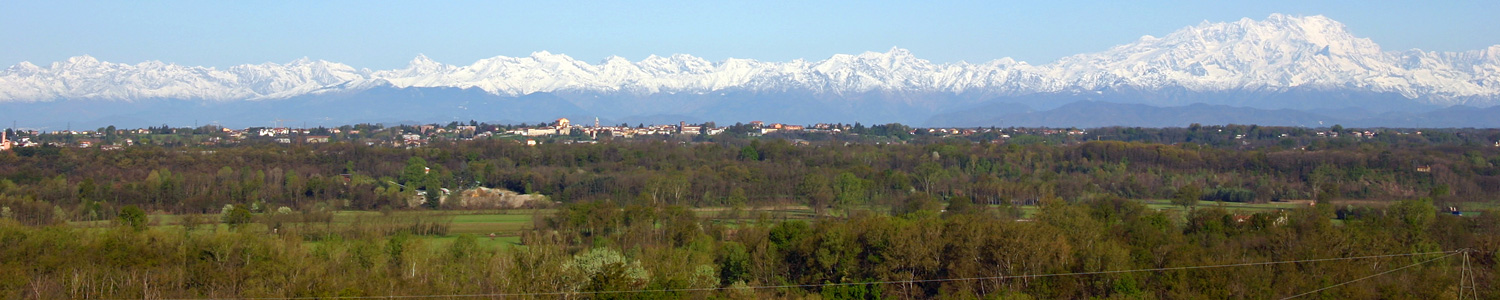 Veduta sulla valle del Ticino dal belvedere di Tornavento, frazione di Lonate Pozzolo (VA). Di fronte la città di Oleggio (NO), sullo sfondo le alpi e il Monte Rosa